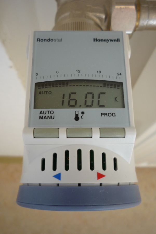 elektronischer Raumthermostat Honeywell HR 20